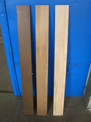 Thermoholz der Rotbuche (Fagus sylvatica) im Vergleich (von rechts nach links): gedämpft (Rotkern), TMT-Buche 190 (thermobehandelt bis ca. 190 °C), TMT-Buche 200 (thermobehandelt bis ca. 200°C).